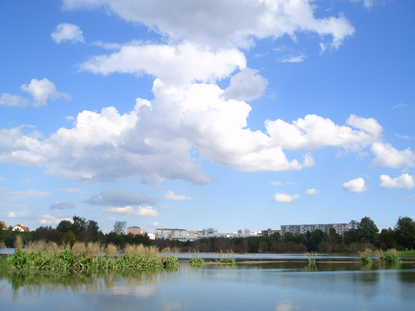 Freizeitanlage Wimpassing in Wels